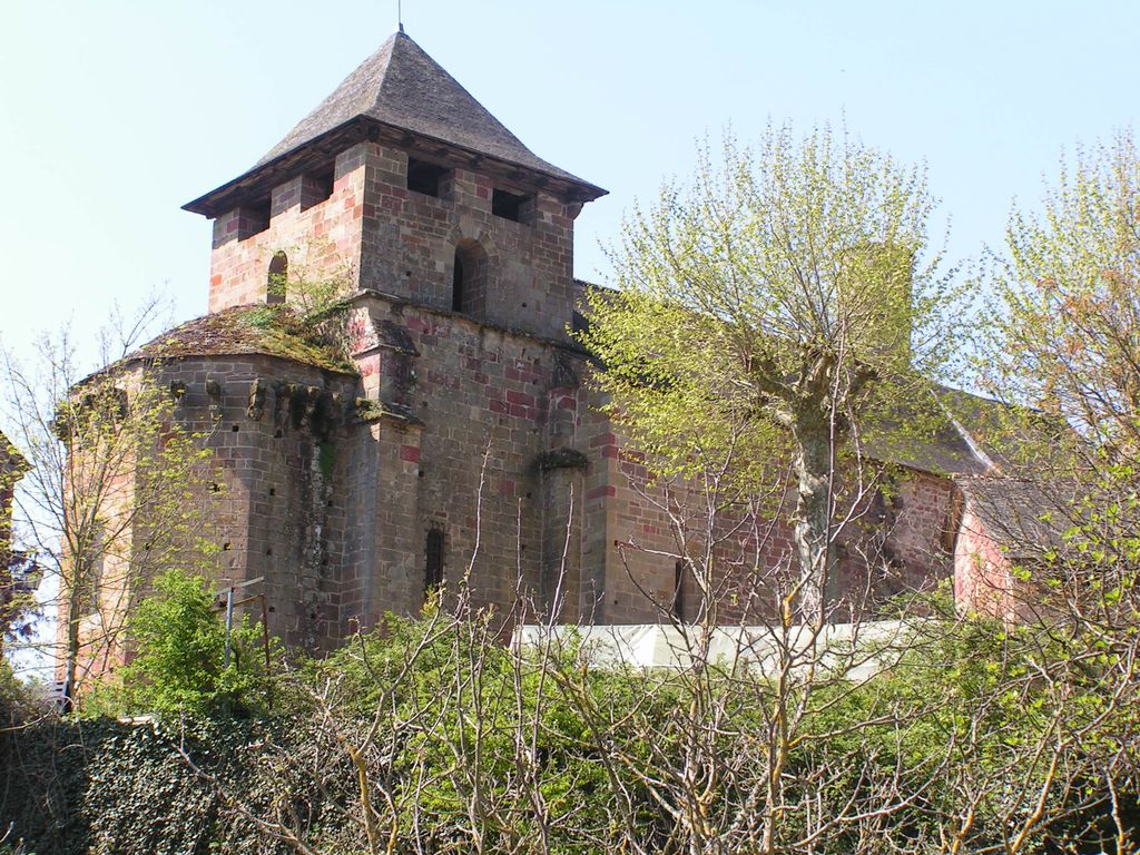 Eglise Saint-Pierre-ès-Liens